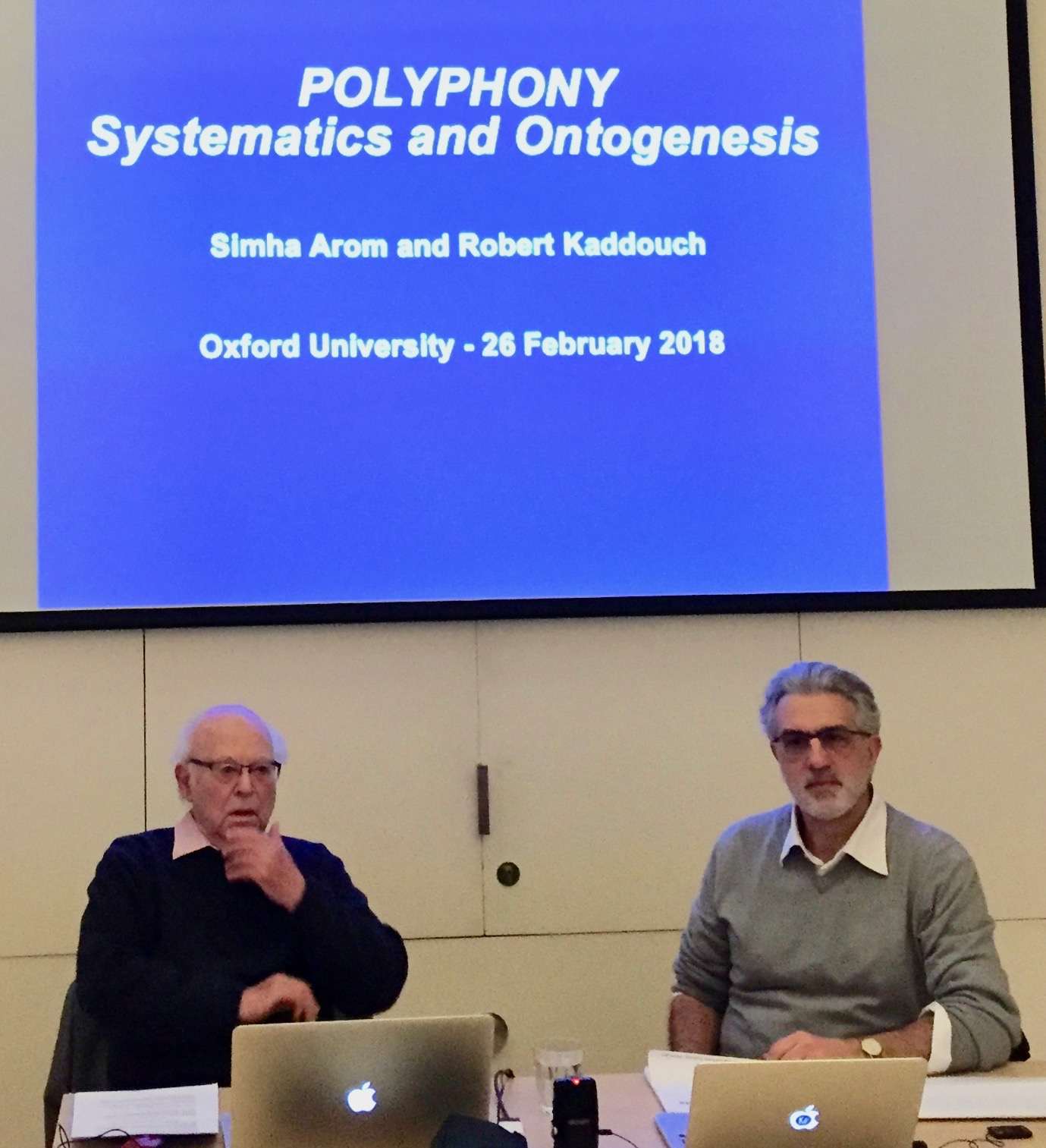 Robert Kaddouch et Simha Arom à l'université d'Oxford, conférence "Polyphoniy and Ontogenesis", le 26 février 2018